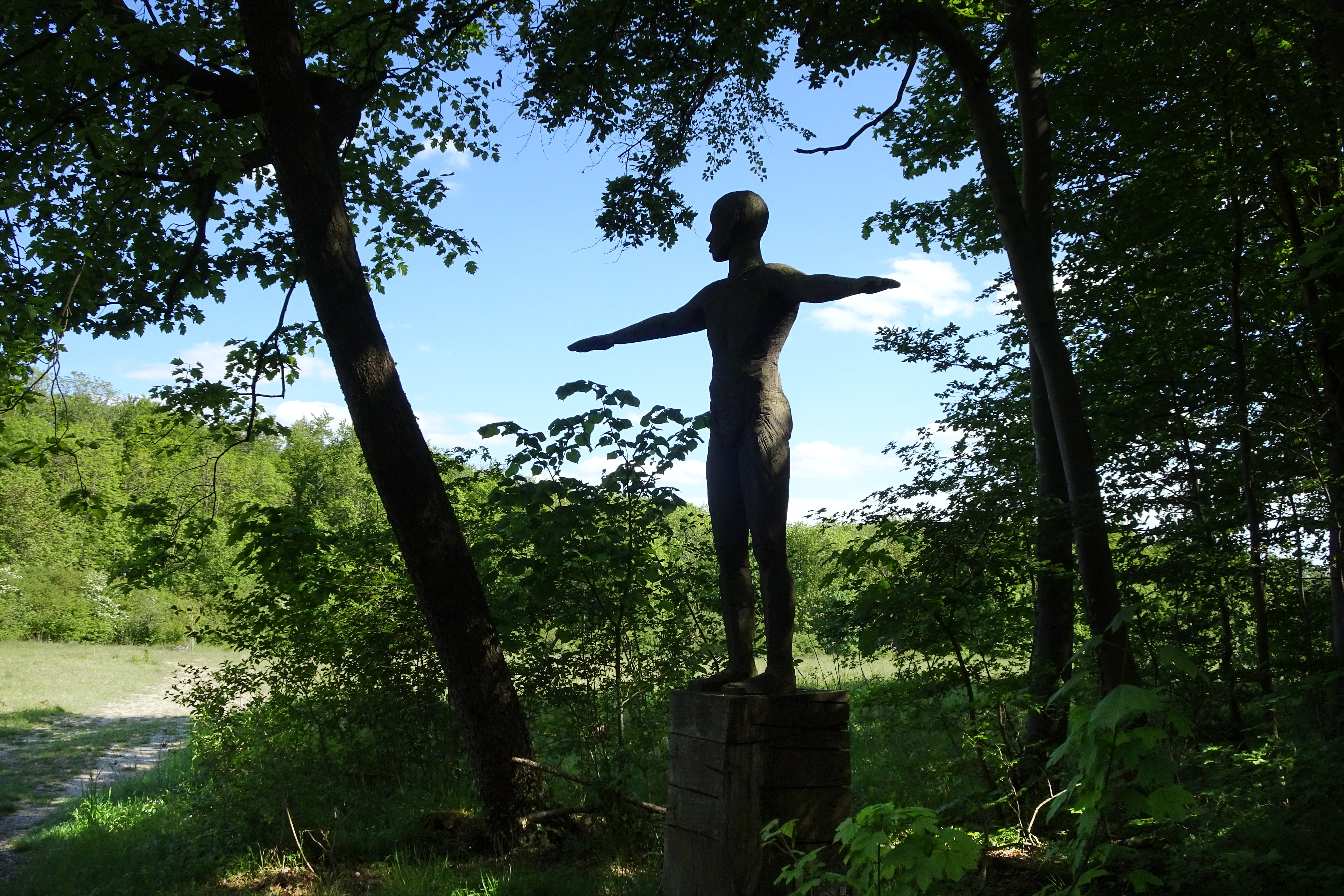 Das Naturschutzgebiet „Dreiherrenstein-Eschenberg-Kreutzerberg“ liegt im nordhessischen Werra-Meißner-Kreis und erstreckt sich entlang der Landesgrenze zu Thüringen. Das von Bergen mit steilen Hängen, Felsen und Bergstürzen geprägte Gebiet besitzt naturnahe Buchenwälder, Felsfluren, Feuchtwiesen und extensiv bewirtschaftete Offenlandbereiche. Als national bedeutsam für den Schutz seltener und bestandsgefährdeter Tier- und Pflanzenarten der Kalkbuchenwälder eingestuft, wurde der Bereich im Frühjahr 1998 zum Naturschutzgebiet erklärt und später als ein Teilbereich des Flora-Fauna-Habitat-Gebiets „Kalkberge bei Röhrda und Weißenborn“ in dem europaweiten Netz von Schutzgebieten „Natura 2000“ verankert. Das Naturschutzgebiet ist 209,38 Hektar groß, hat die nationale Kennung 1636036 und den WDPA-Code 318304.